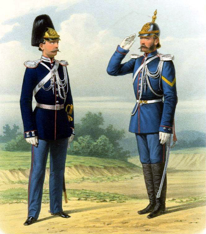 Жандармские команды (Парадная и походная формы.) 16 сентября 1872.